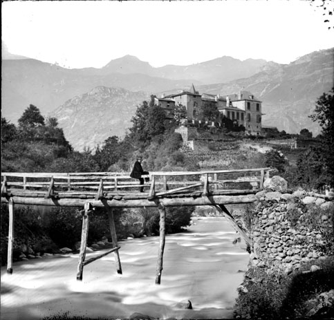 Fonds Trutat - Photographie ancienne Cote : TRU C 2542 Localisation : Fonds ancien (S 30) Original non communicable Rôle de l’auteur : Photographe Lieu de création : Château-Verdun (Ariège) Date de création : 1859-1910 [entre] Mesures : : 8 x 9 cm Observations : Note manuscrite de Trutat : " Château de Gudanes près les Cabannes (Ariège), collodion albuminé, cliché Sans". Une photocopie du tirage papier de Dieuzaide. Mot(s)-clé(s) : -- Château -- Promontoire -- Montagne -- Rivière -- Pont -- Bois -- Construction sur pilotis -- Homme -- Assis -- Garde-corps -- Arbre -- Végétation -- Muret -- Pierre -- Château de Gudanes (Ariège) -- Château-Verdun (Ariège) -- Cabannes, Les (Ariège ; canton) -- Ariège (Midi-Pyrénées) -- Ariège (France ; vallée) -- Midi-Pyrénées (France) -- 19e siècle, 2e moitié -- 20e siècle, 1e quart -- 18e siècle Médium : Photographies -- Négatifs sur plaque de verre -- Noir et blanc -- Paysages de montagne -- Collodion albuminé Médium : Positifs sur plaque de verre -- Noir et blanc -- Stéréogrammes -- Paysages industriels Bibliothèque de Toulouse. Domaine public